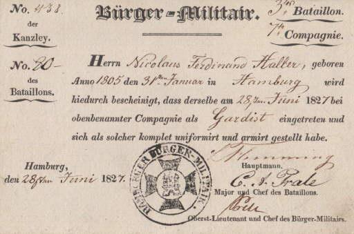 Ausweis 1827 des Hamburger Bürger-Militair`s. 3. Bataillon, 7. Compagnie. Für Nicolaus Ferdinand Haller, geboren anno 1805 den 31. Januar in Hamburg